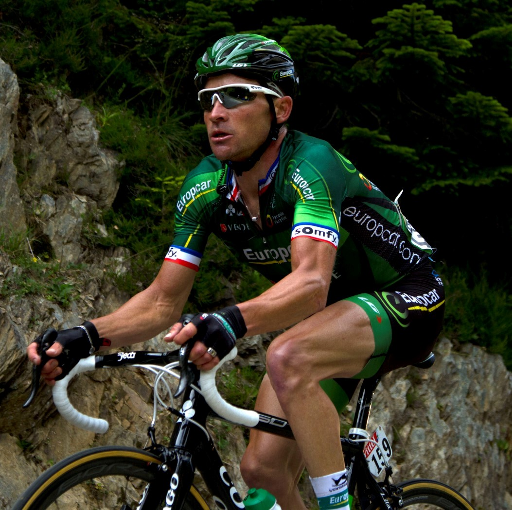 048 voeckler ziet het niet meer zitten